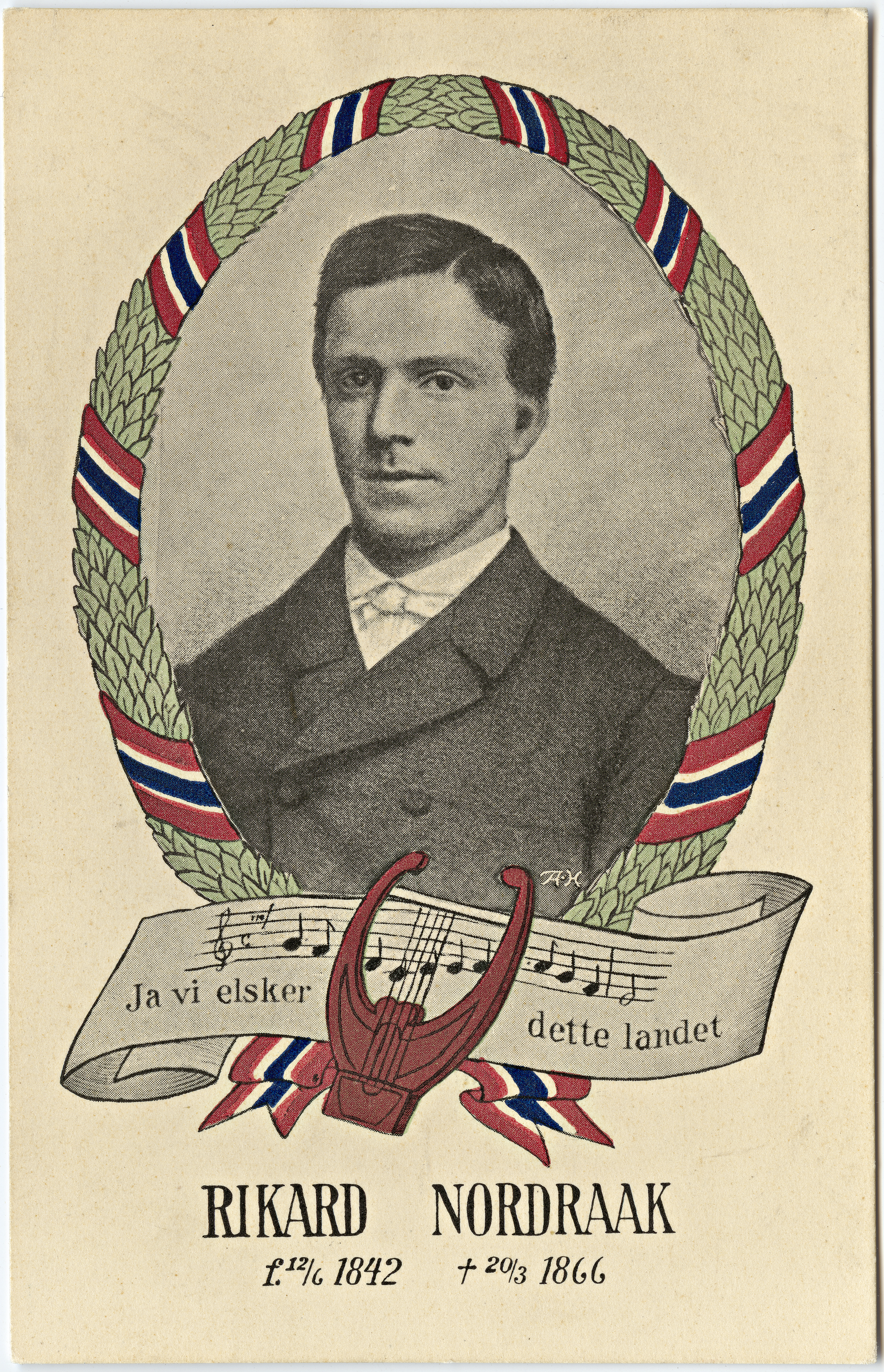 Beskrivelse / Description: Postkort. Dato / Date: Nordraak var komponist og skrev bl.a. melodien til "Ja, vi elsker dette landet" Fotograf / Photographer: ukjent / unknown Utgiver / Publisher: ukjent / unknown Digital kopi av original / Digital copy of original: trykt postkort, farge Eier / Owner Institution: Nasjonalbiblioteket / National Library of Norway Lenke / Link: Bildesignatur / Image Number: blds_02183